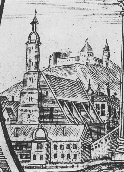 Беларуская (тарашкевіца): Катэдра ў Вільні